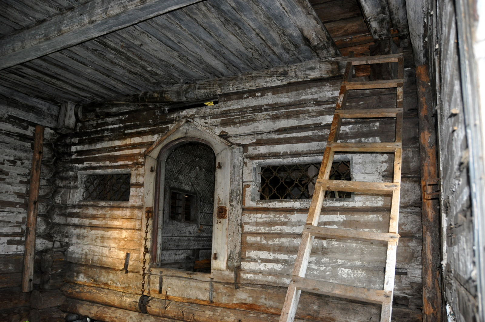 Интерьер церкви в Чухчерьме